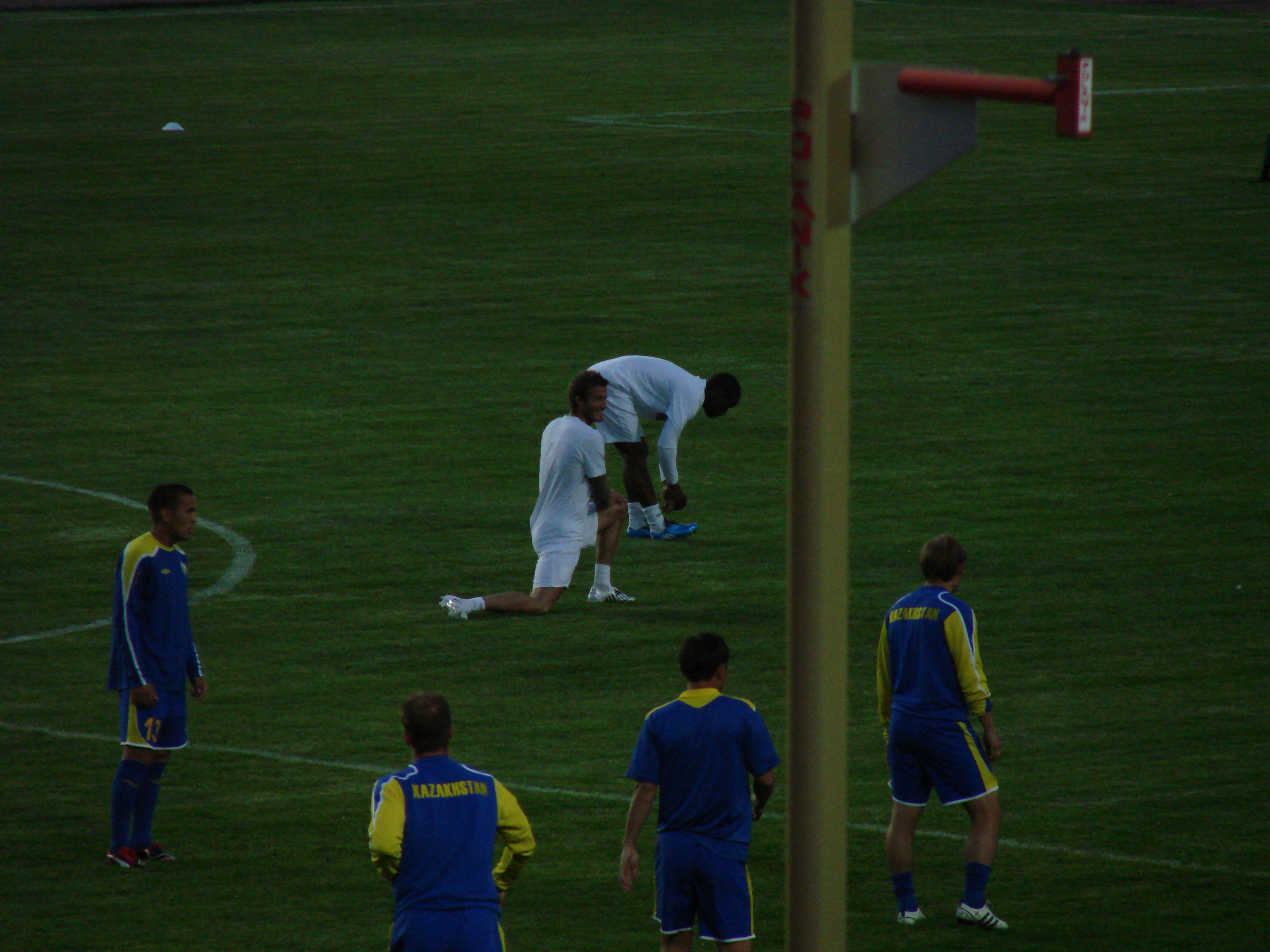 Дэвид Бэкхам (матч отборочного тура чемпионата мира, Алма-Ата, Казахстан)